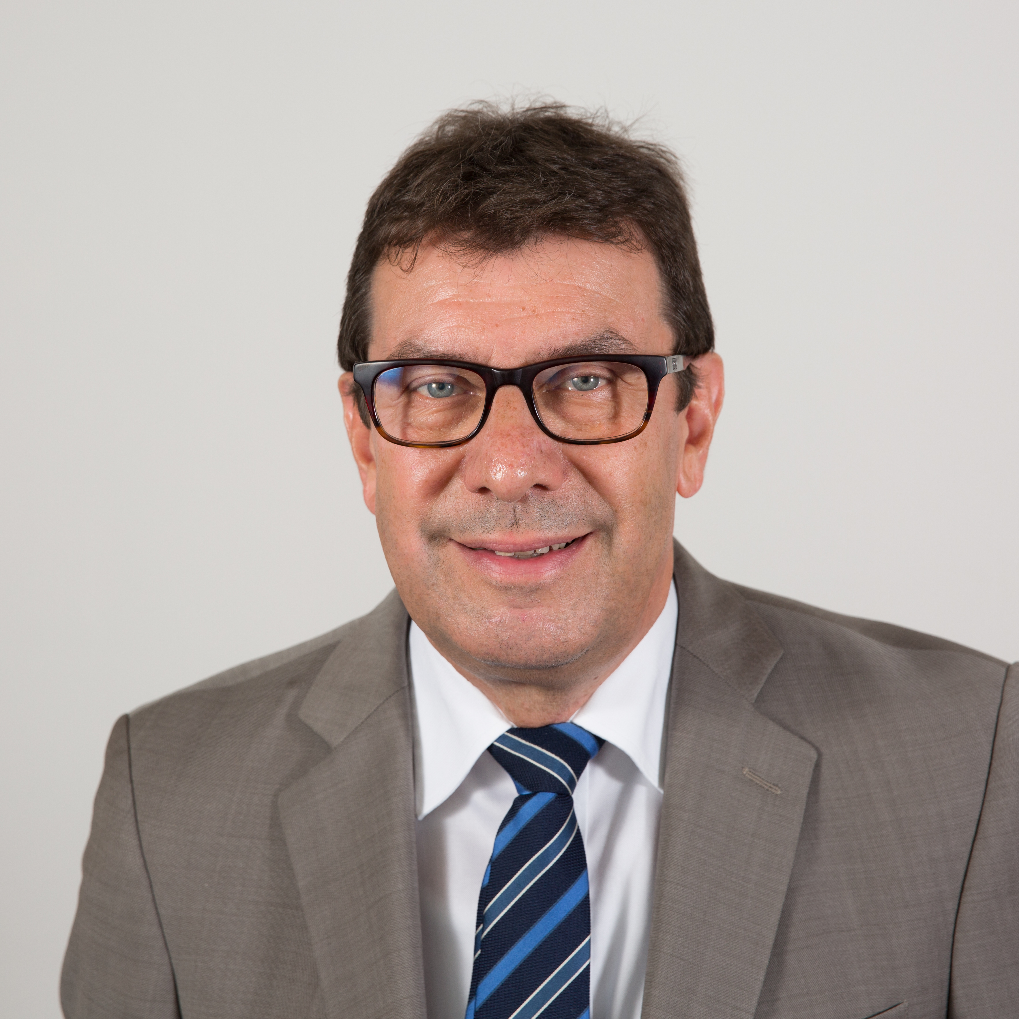 Der saarländische Landtagsabgeordnete Hans Peter Kurtz